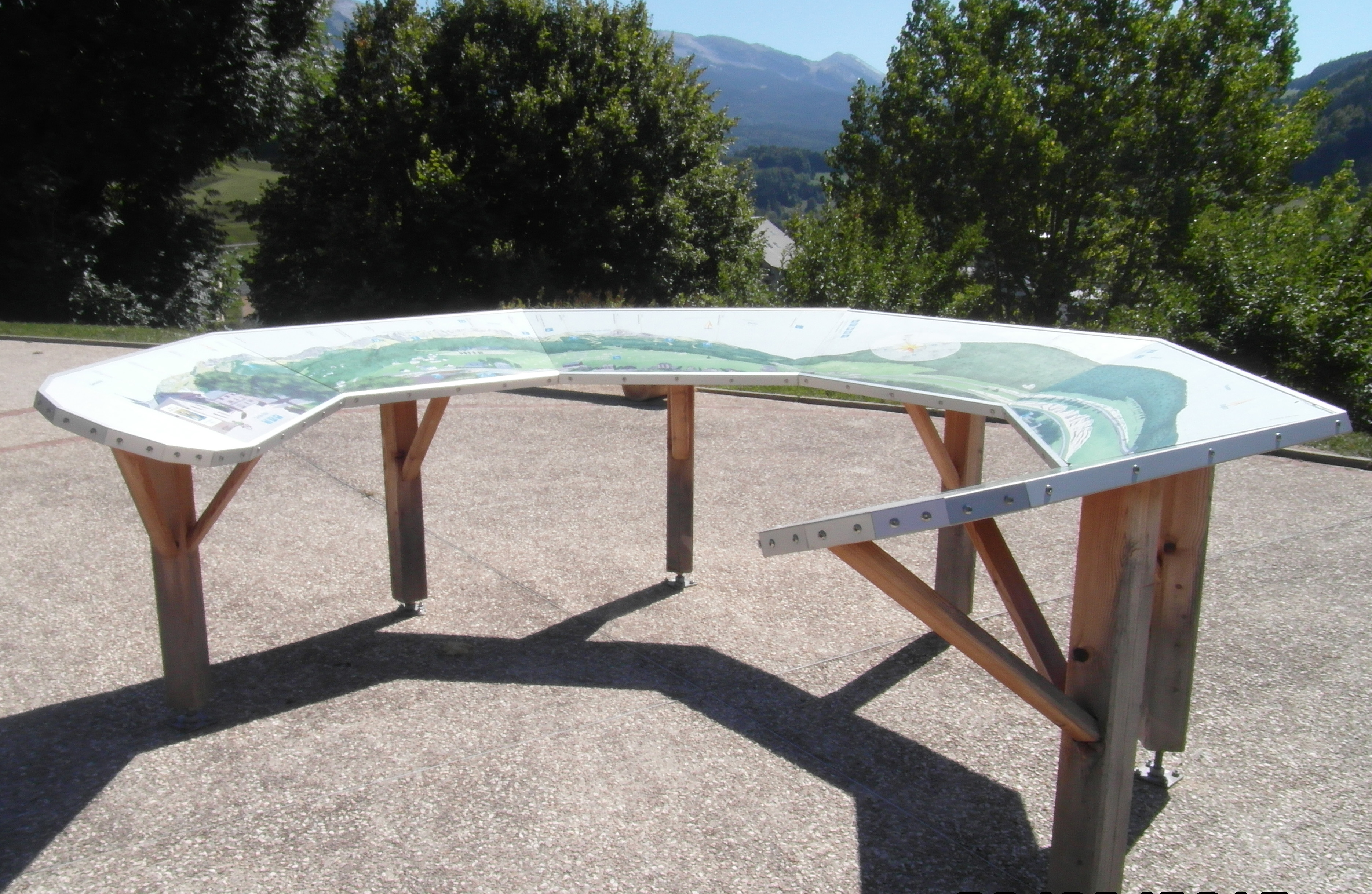 table d'orientation à Villard de Lans